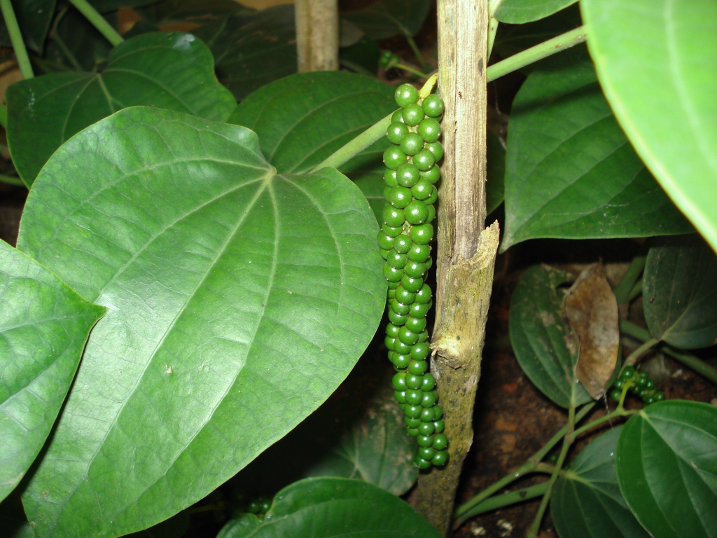 അനുമതി